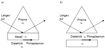 Prisma sidestus